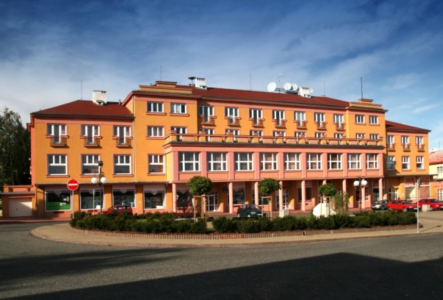 Městský úřad Horní Slavkov